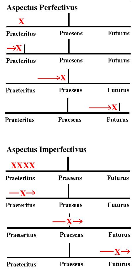 Aspectus perfectivus et imperfectivus